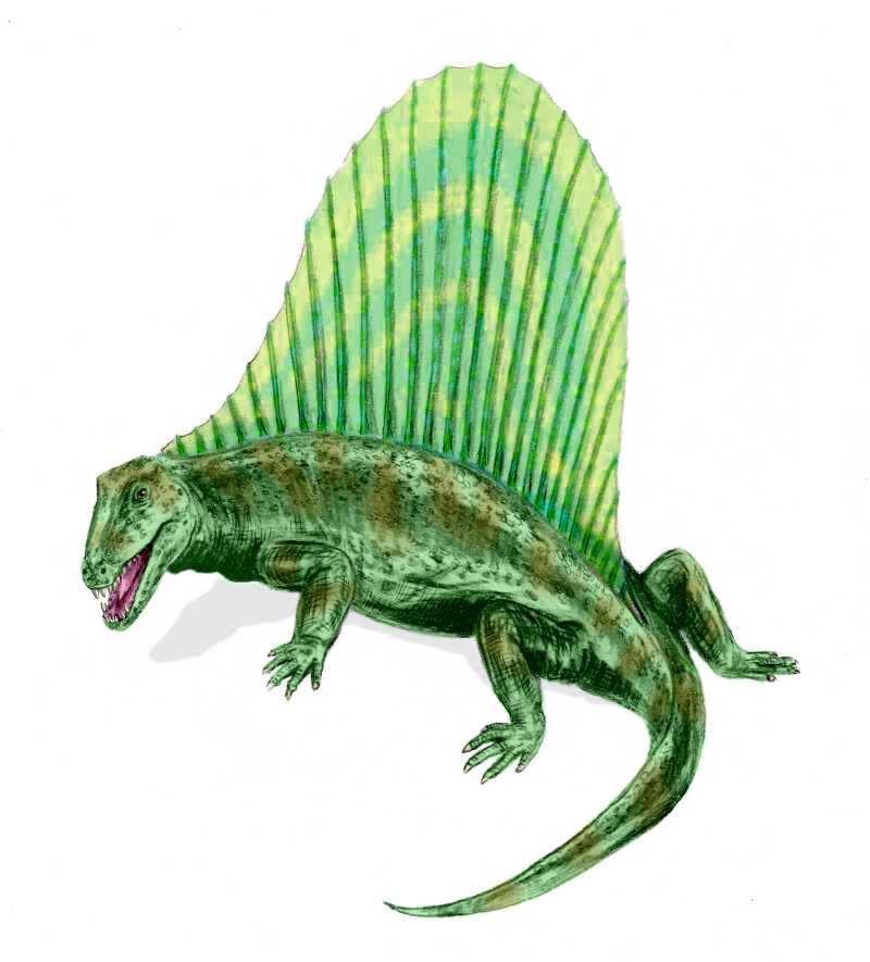 Dimetrodon limbatus, pencil drawing